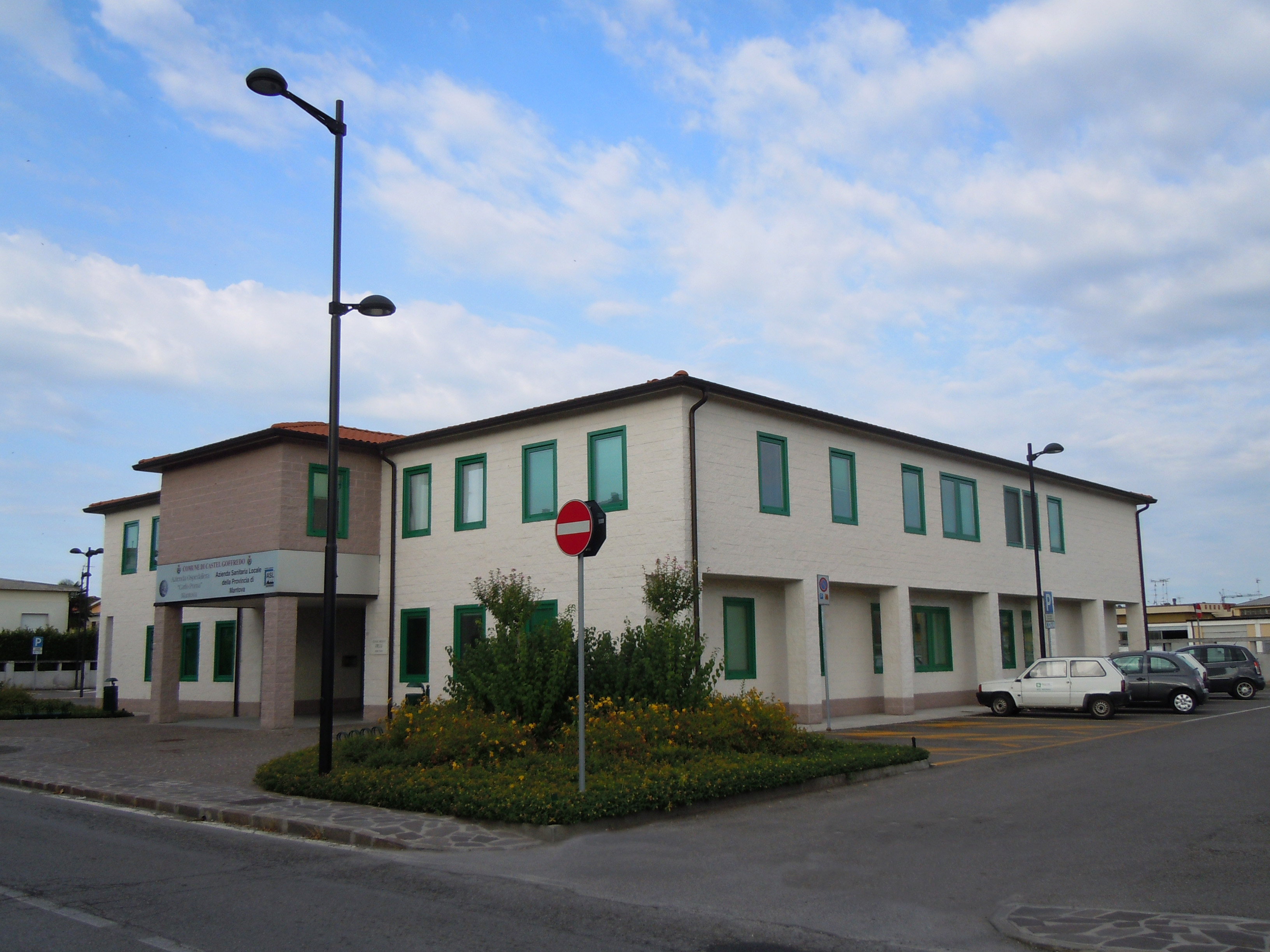 Castel Goffredo, centro medico Iris.